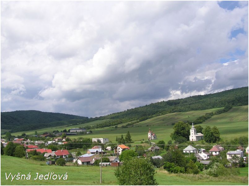 Celkový pohľad